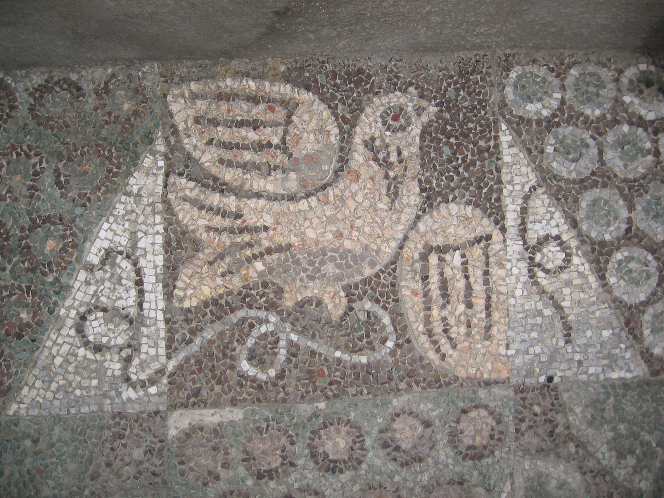 Мозаїка